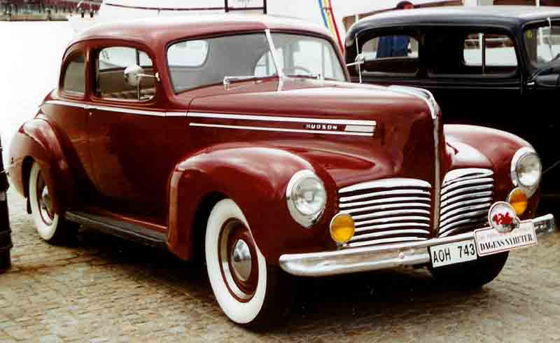 Hudson Commodore Six (Series 12) Coupé (1941)